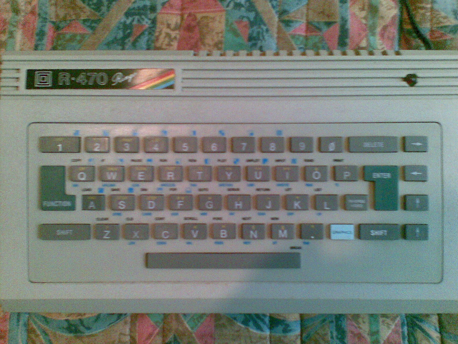 O meu Ringo tem autógrafo do Ademir Carchano!